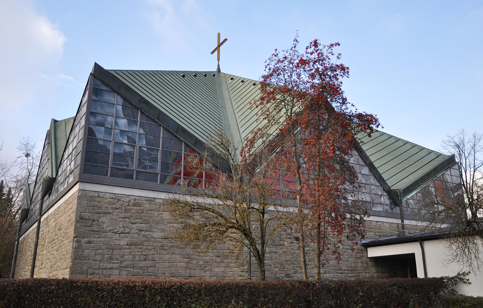 Außenansicht St. Hildegard München